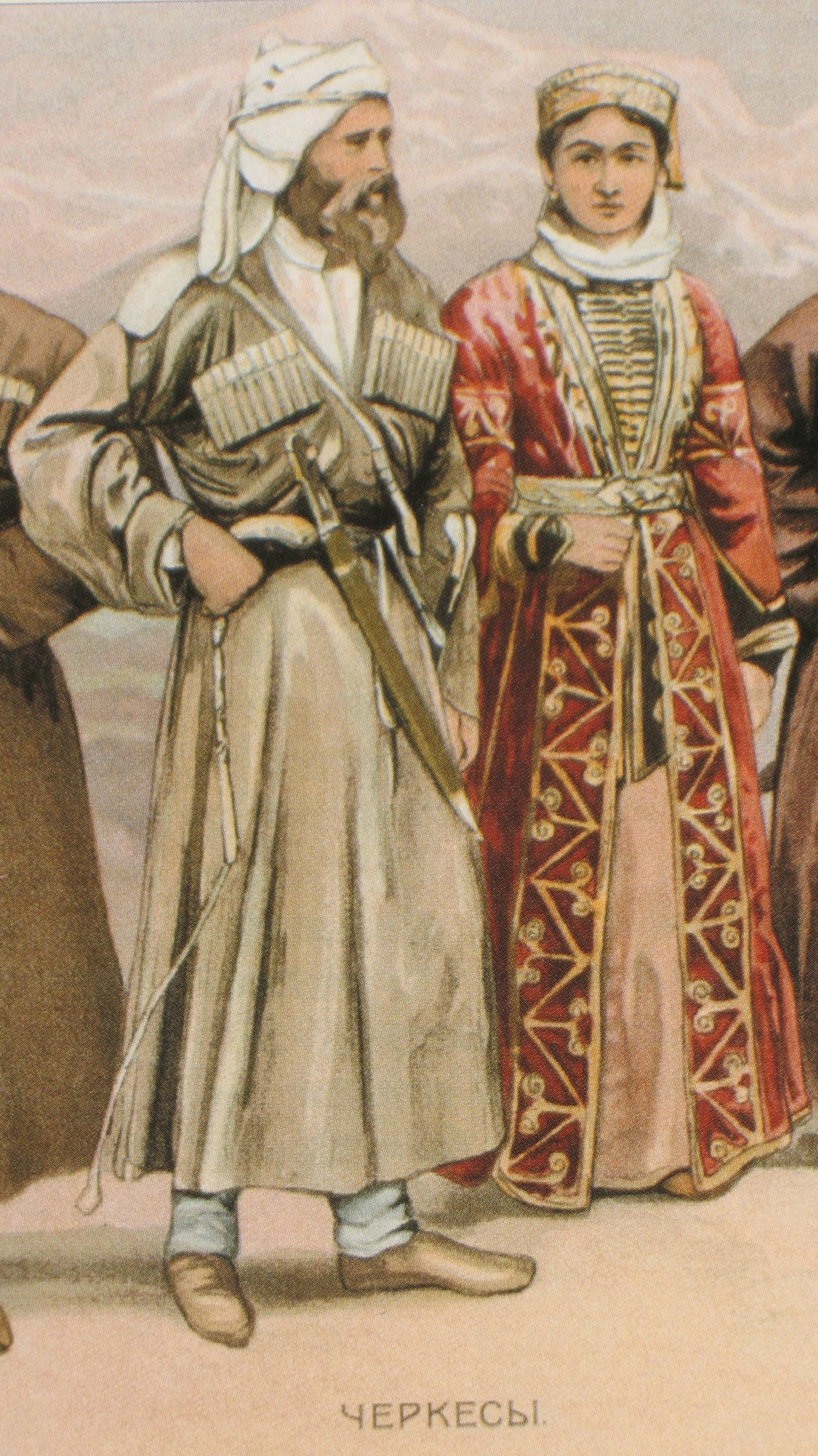 Народы Кавказа. Черкесы. Русская литография. Конец 19 века.